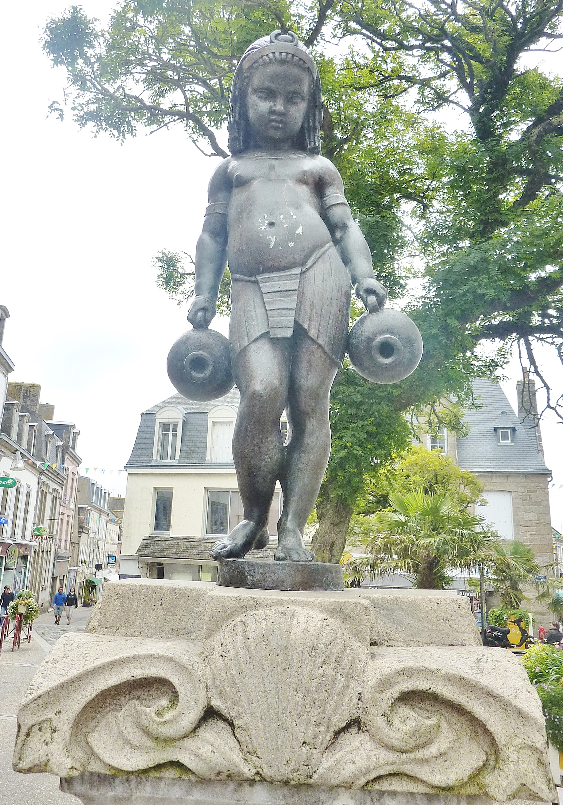 Douarnenez : la statue du Bolomig, place Gabriel Péri. Cette statue, qui date de 1860 et surplombe une fontaine publique est un peu l'emblème de Douarnenez. Son nom provient de Bolomig Tal ar Groas en breton ("Petit bonhomme de la place de la Croix", nom que portait la place à l'époque). Son allure de statue égyptienne est due à la mode de l'égyptomanie qui existait alors. Déboulonné en 1932 pour faire place à un parking, il a été réinstallé en 1990. Il s'agit ici d'une copie de l'original qui se trouve désormais dans le hall de la mairie de Douarnenez.